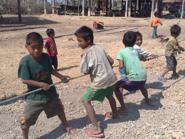 Autore: Toni Rüttimann Descrizione: Anche i ragazzi aiutano nella costruzione dei ponti